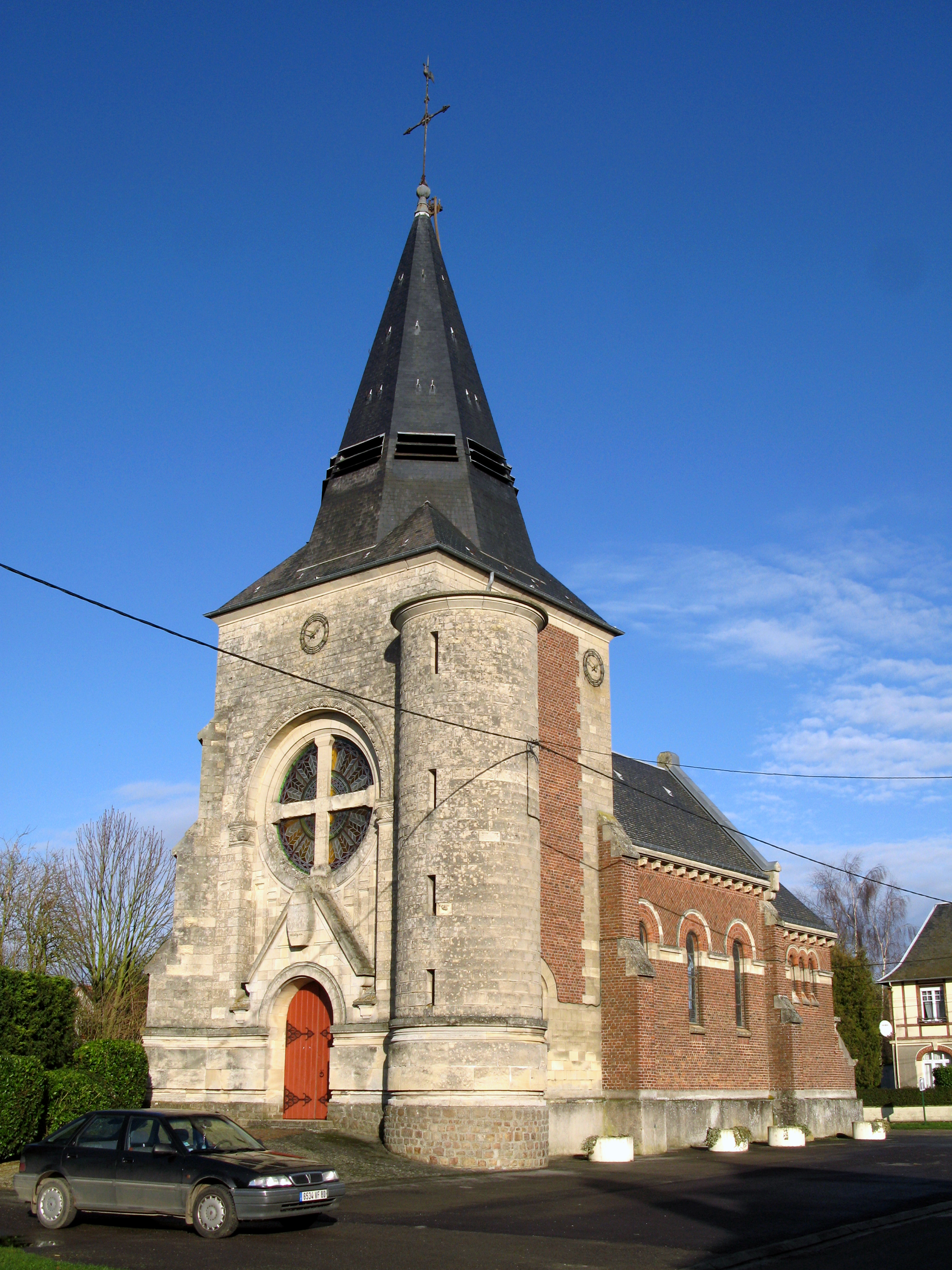 Poeuilly (Somme, France) - L'église. .